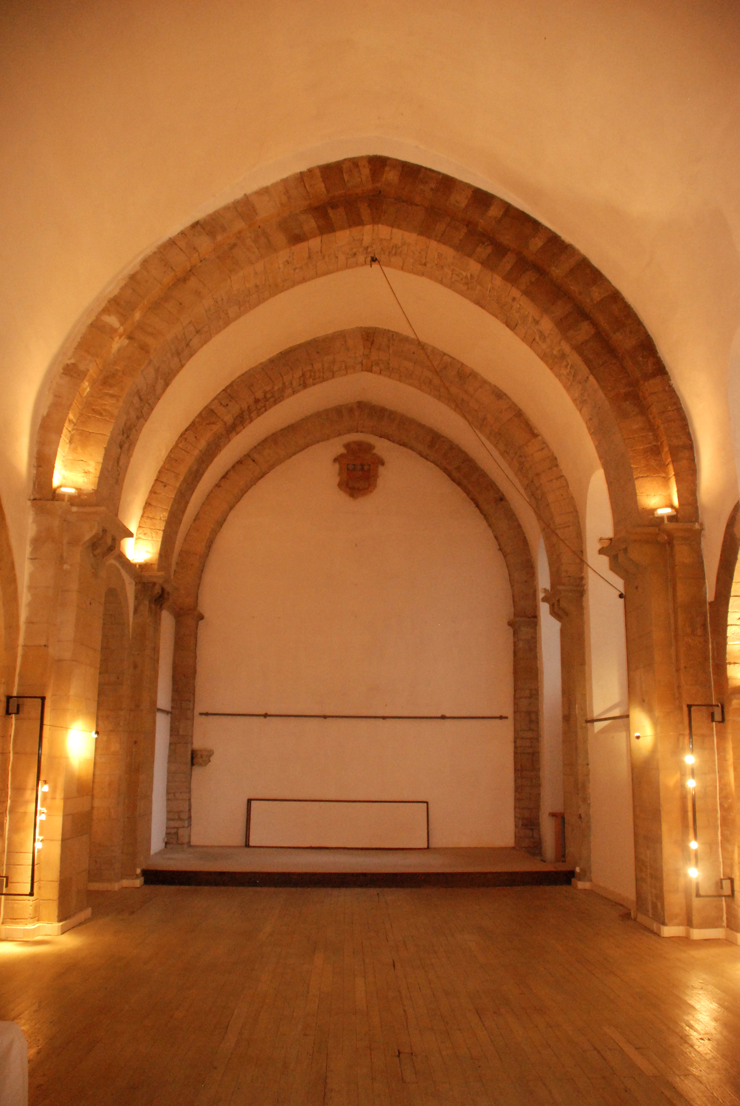 France - Bourgogne - Saône-et-Loire - Tournus - église Saint-Valérien .